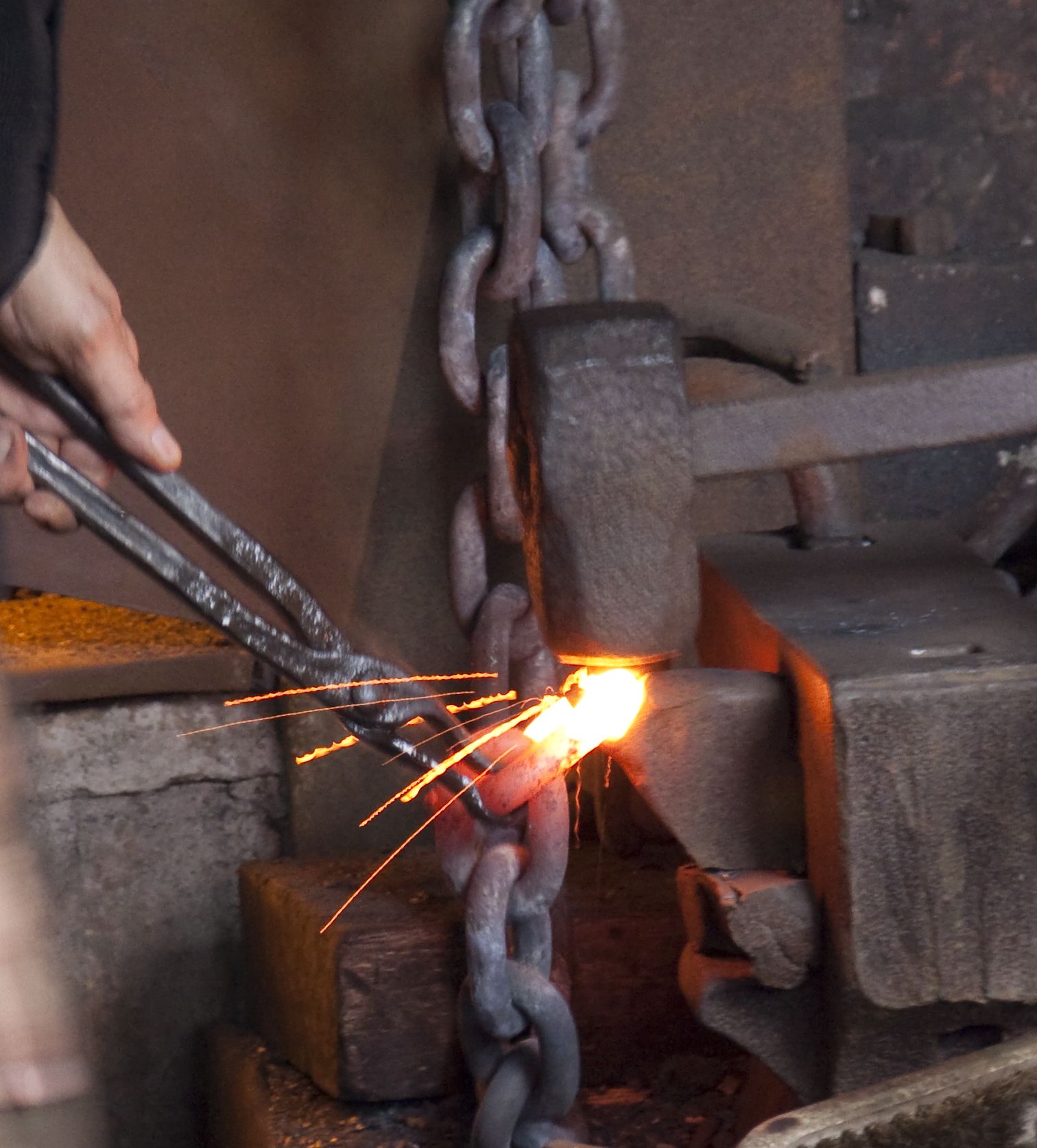 Chain Making 5